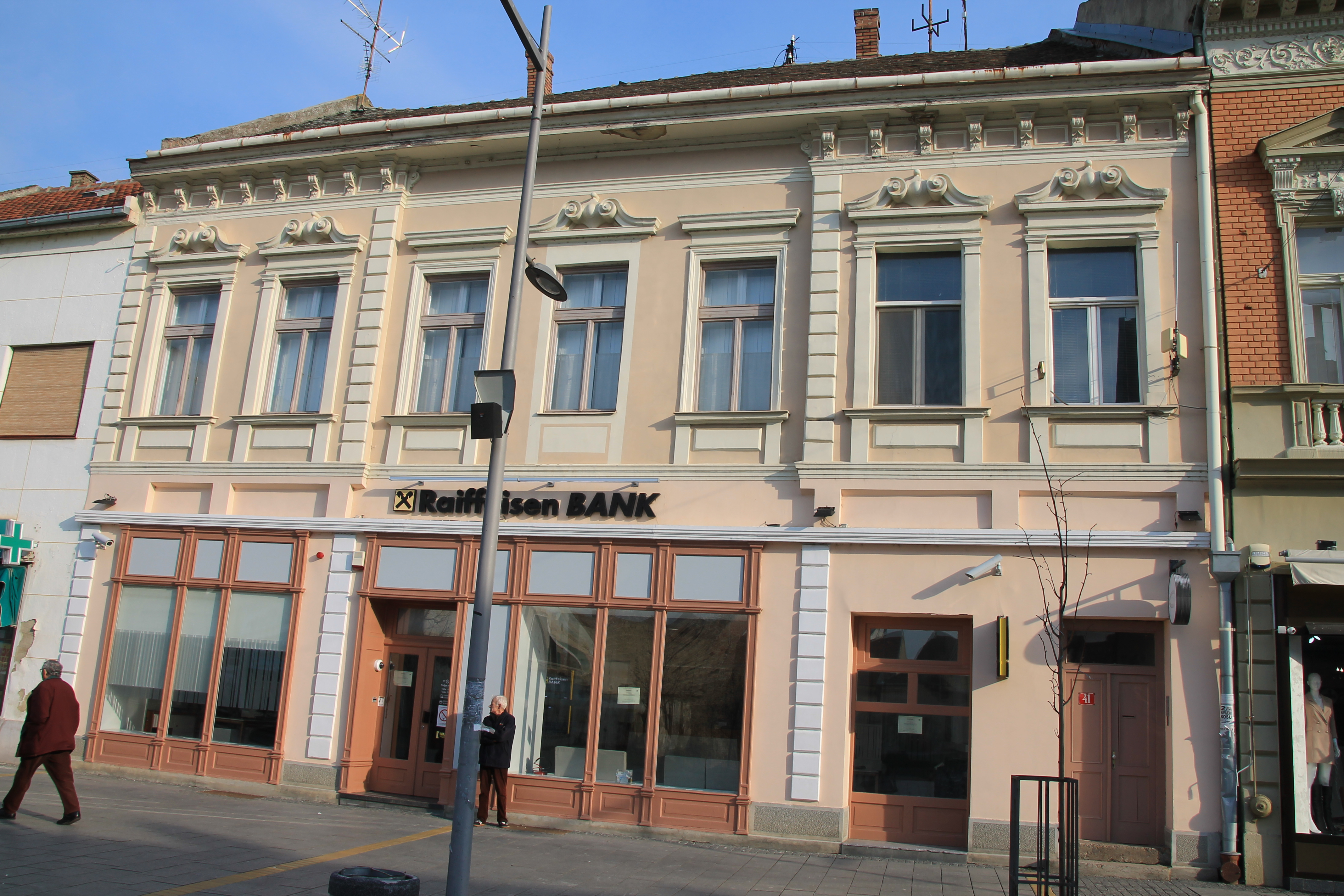 Staro jezgro Zrenjanina